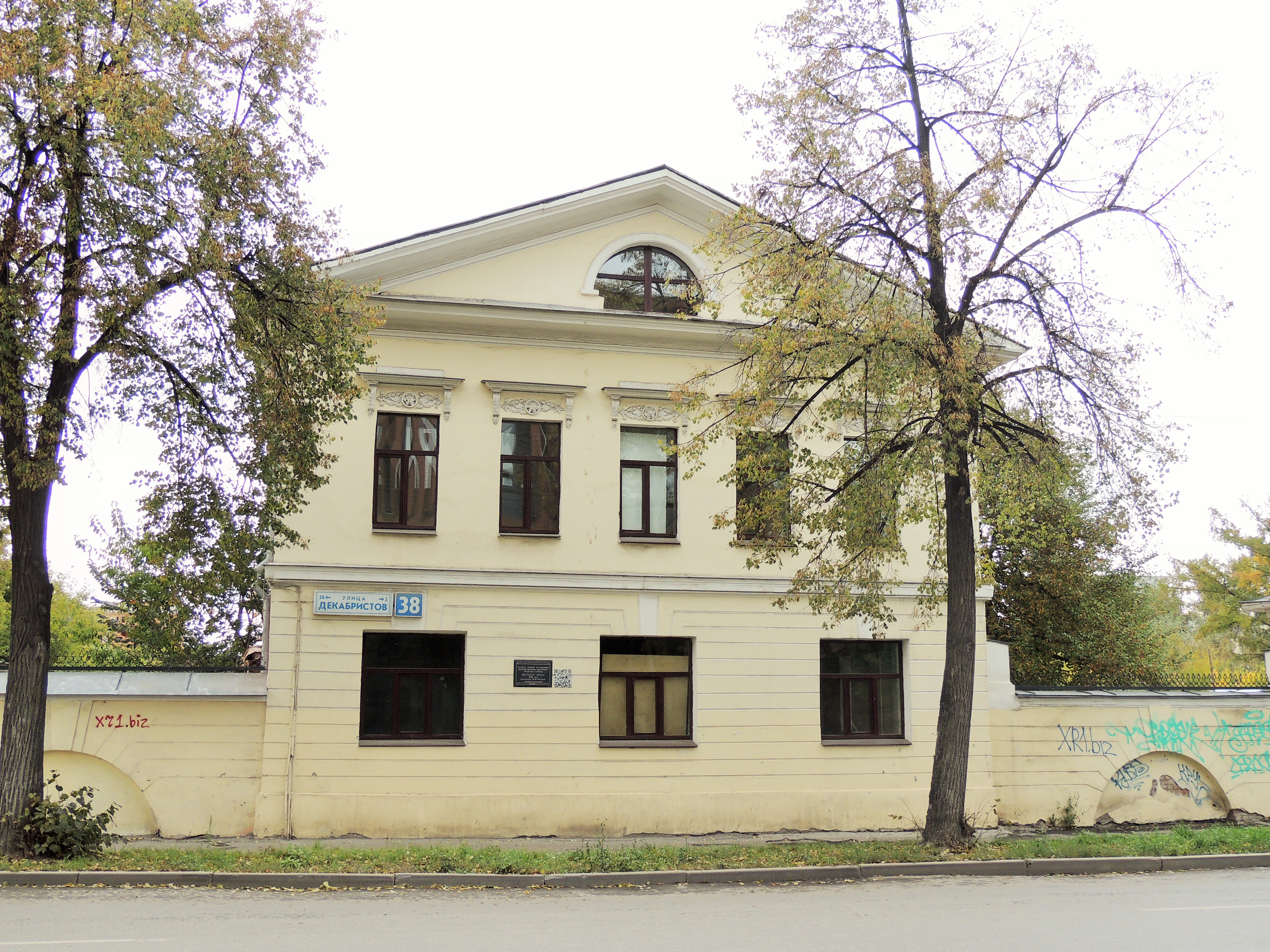 Усадьба Казанцевых: улица Декабристов,36,38, Екатеринбург, Свердловская область